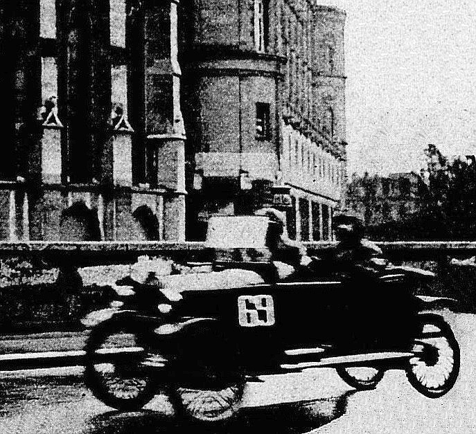 Césure, vainqueur du Tour de France automobile 1922 sur Quadrillette Peugeot 750cm3 Le Monde illustré du 22 avril 1922, p.300